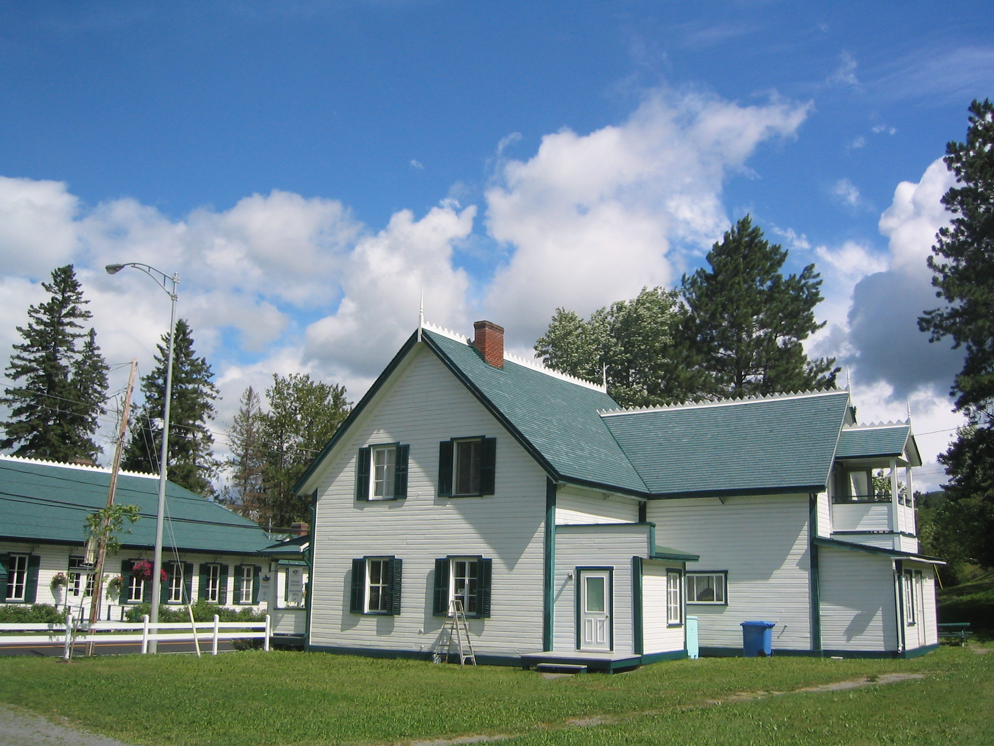 Maison québécoise typique à Causapscal (Gaspésie)